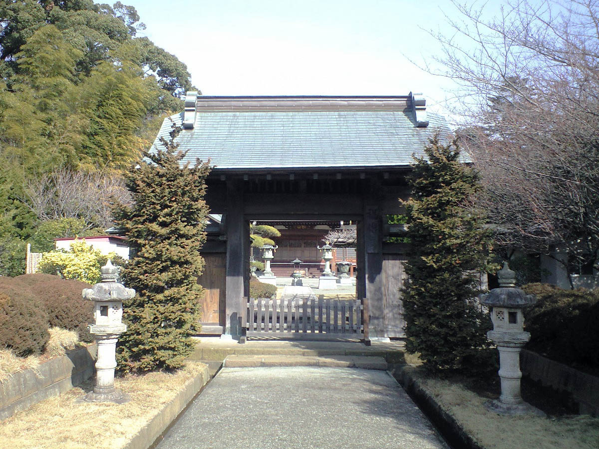 神奈川県厚木市林、曹洞宗福伝寺、山門。荻野山中陣屋裏門からの移築であるとも伝えられている。1989年（平成元年）大改修。